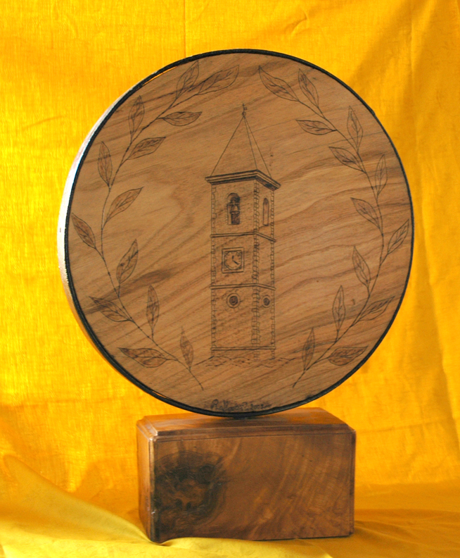 Emblema del gioco della Ruzzola di Petricci